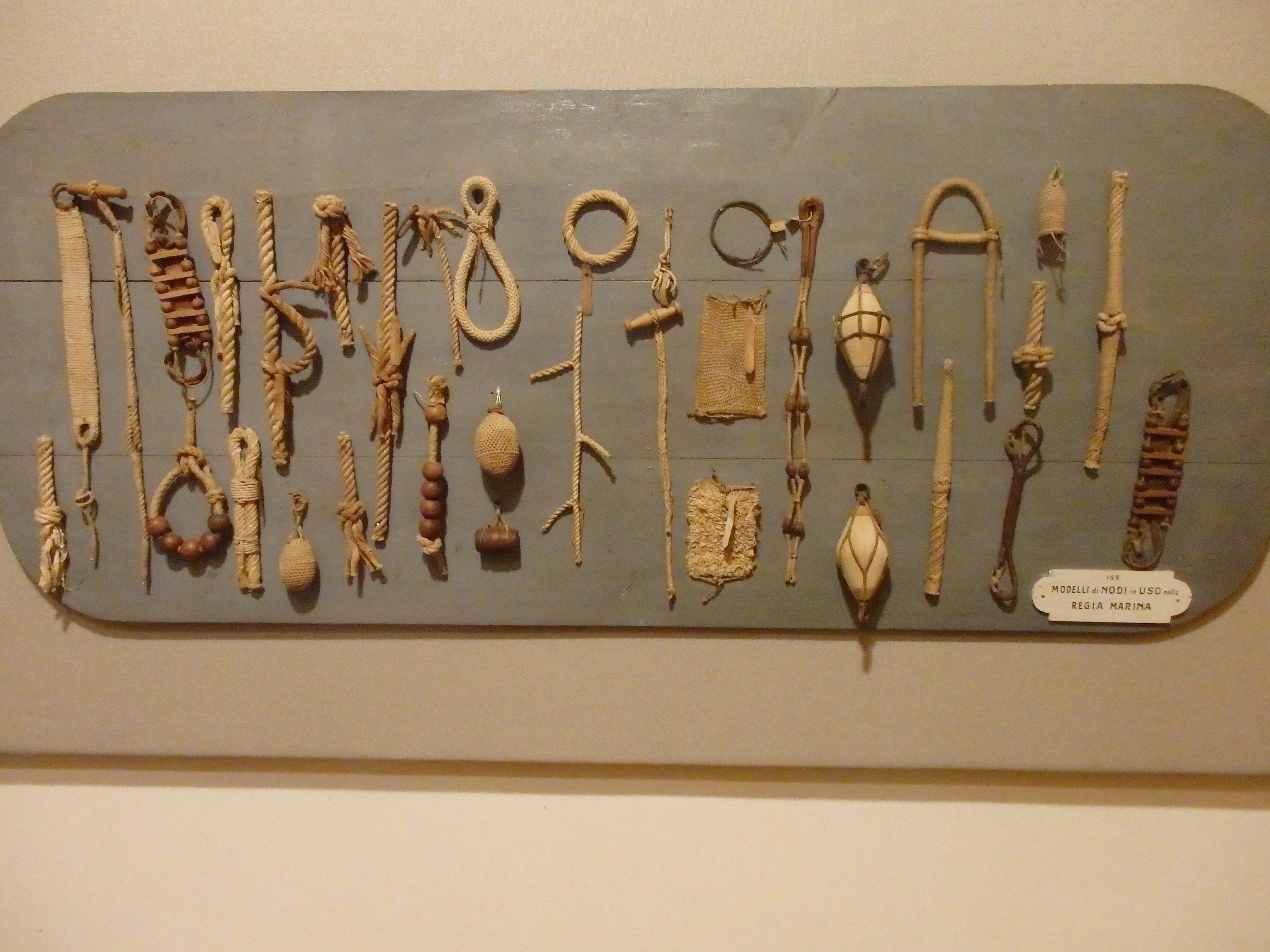 Viste dal Vomero, Napoli.